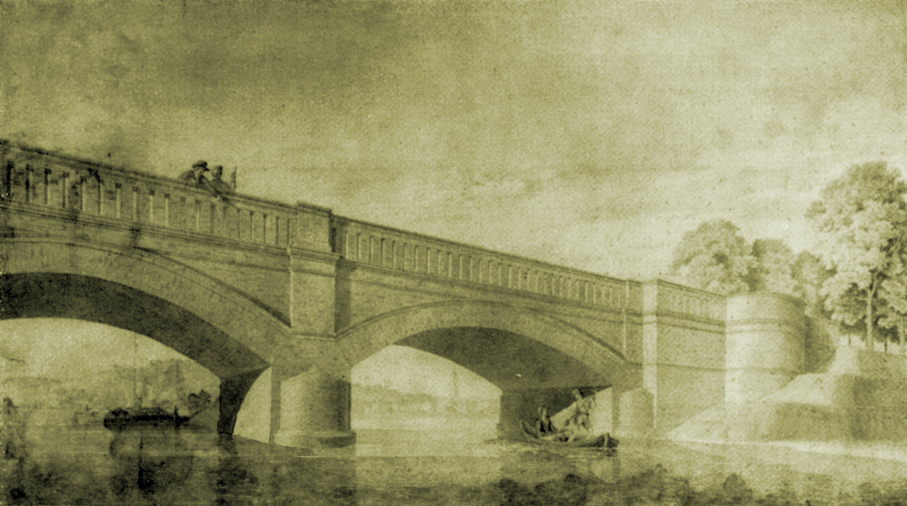 Schinkels Entwurf der Glienicker Brücke, Anschluss am Glienicker Ufer, um 1835